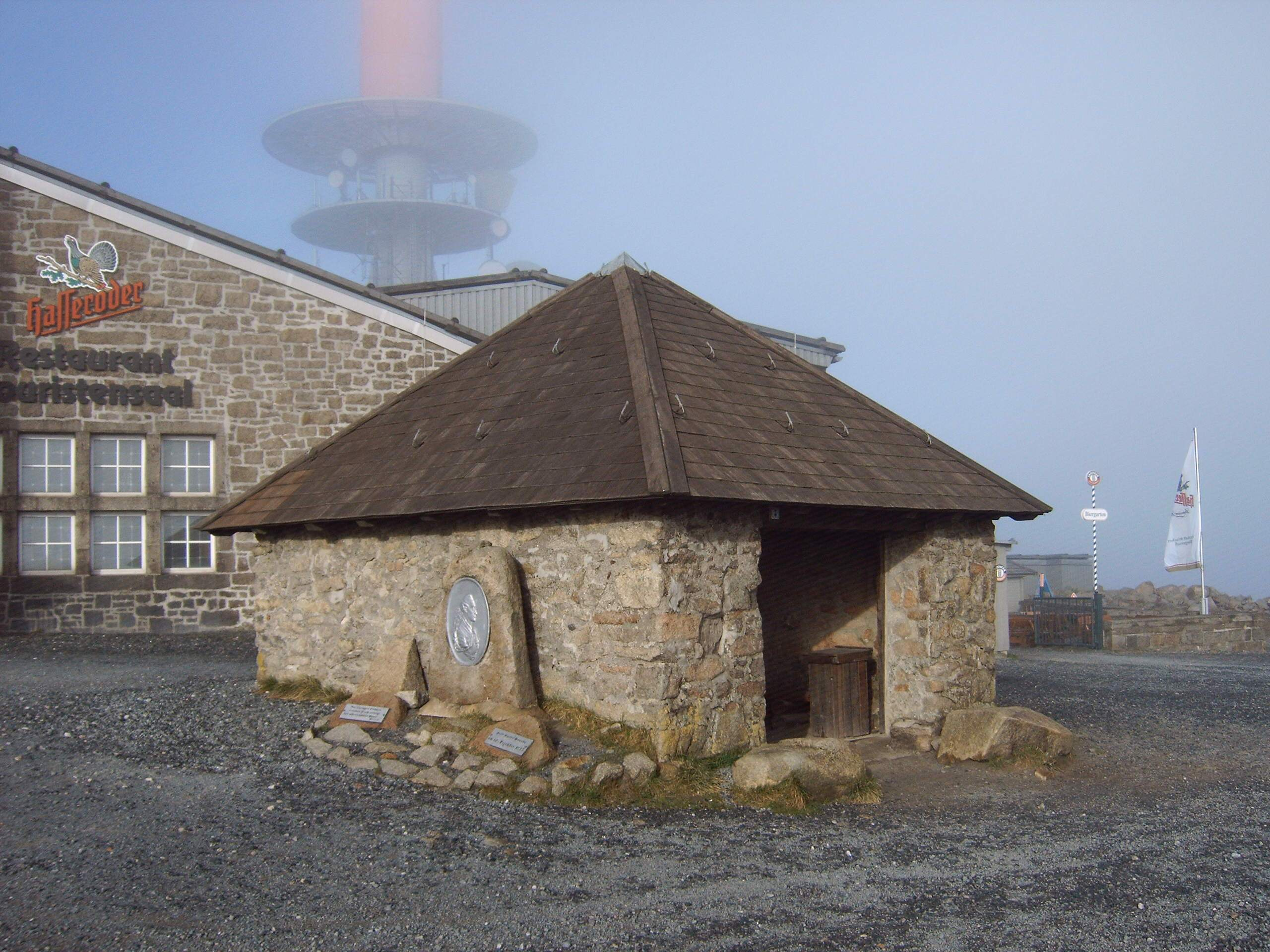 Gebäude auf dem Brocken in Deutschland, Wolkenhäuschen